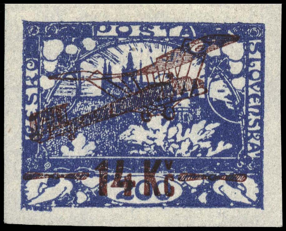 Первая авиапочтововая марка Чехословакии. Надпечатка на марке из серии "Градчаны"